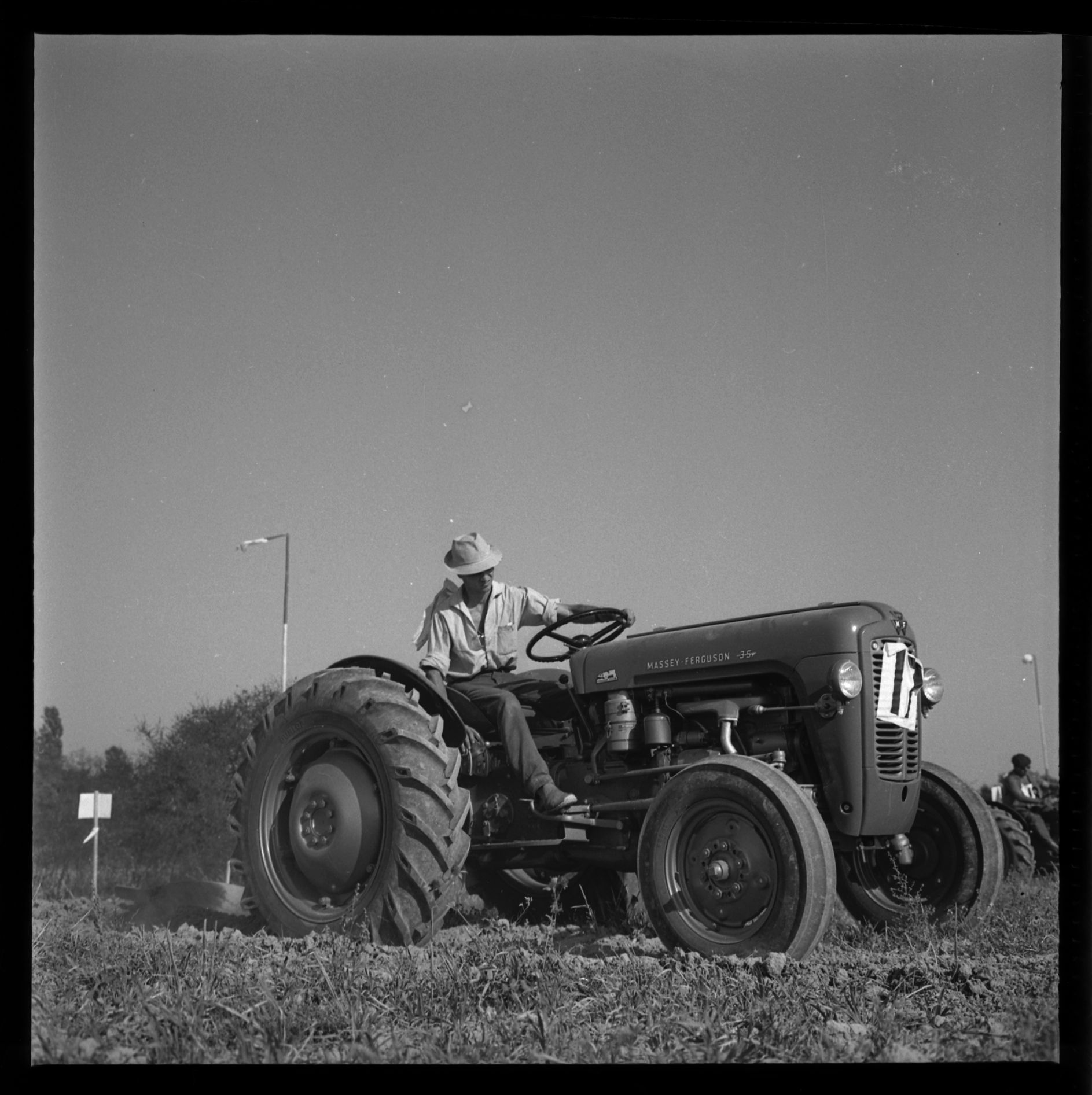 Villemur (Haute-Garonne). 18 septembre 1961. Vue d'un concours de labour.